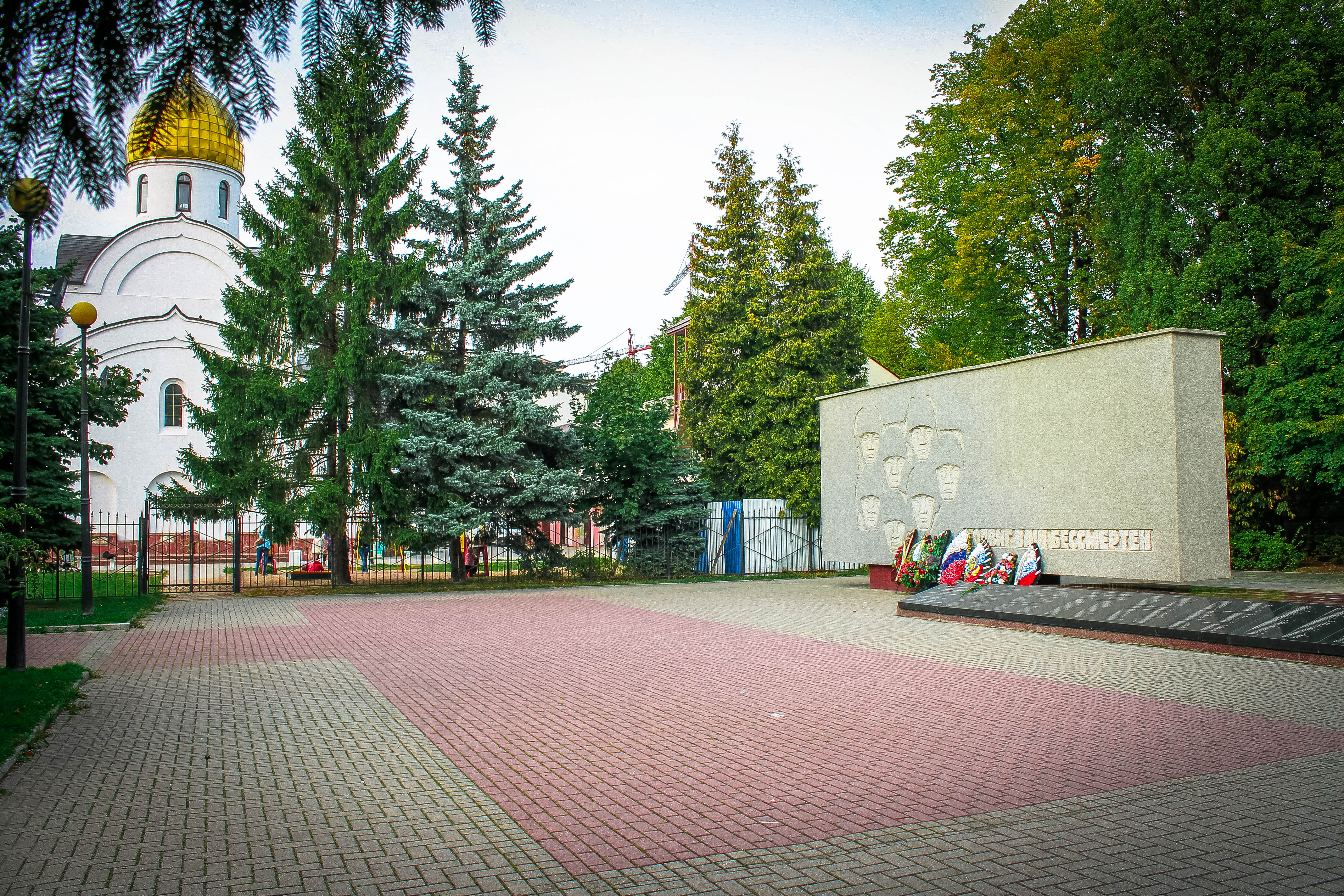 Мемориальный комплекс: улица Комсомольская, сквер, Калининград, Калининградская область